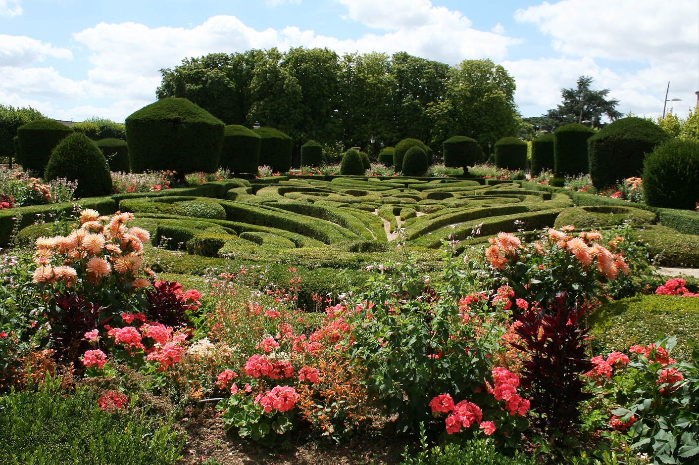 Le jardin de l'évêché de Castres situé devant l'ancien palais de l'évêché. .